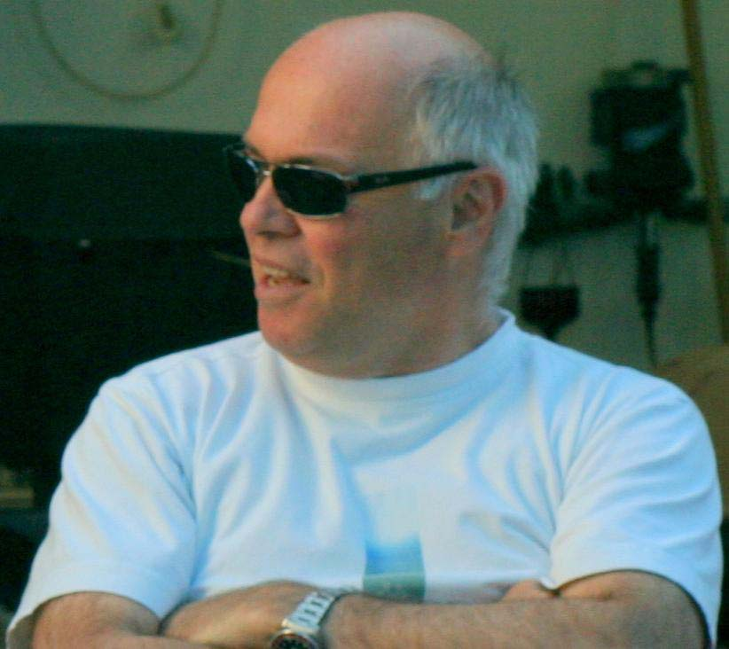 תמונה של אליעזר קלינה בארוע עם חברים, ימים לפני פטירתו